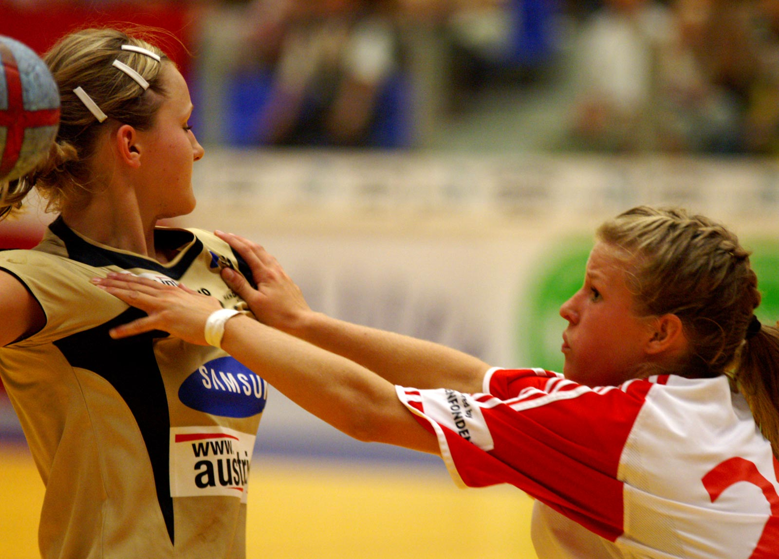 Angriff beim Handballspiel, Junioren Handball EM Woman 17 EXIF: 8 EX Focal lengh: 200mm Aperture: f/2.8 Exposure time: 1/640sec Exposure compensation: +0.7 EV ISO: 1600